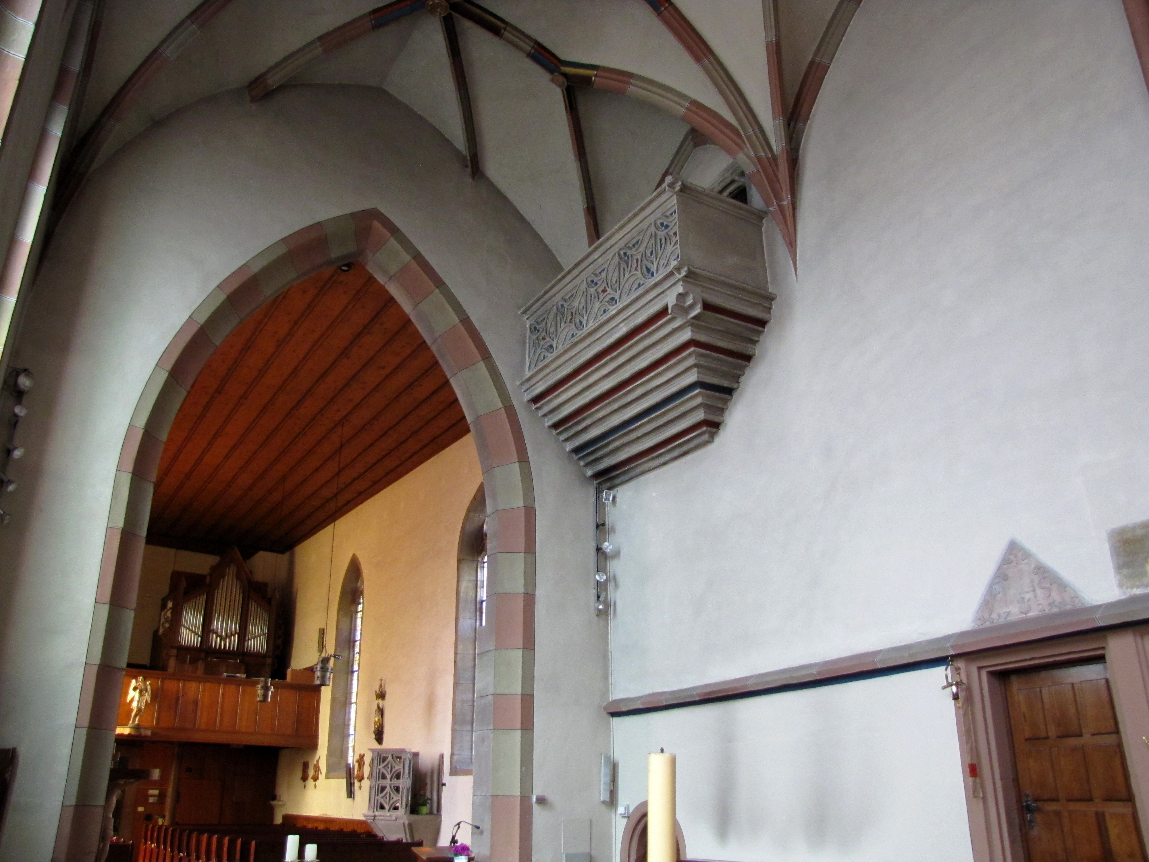 Alsace, Bas-Rhin, Sarrewerden, Église Saint-Barthélemy (ancienne Collégiale Saint-Blaise) (PA00084945, IA67005982): Ancien balcon des comtes dans le chœur.